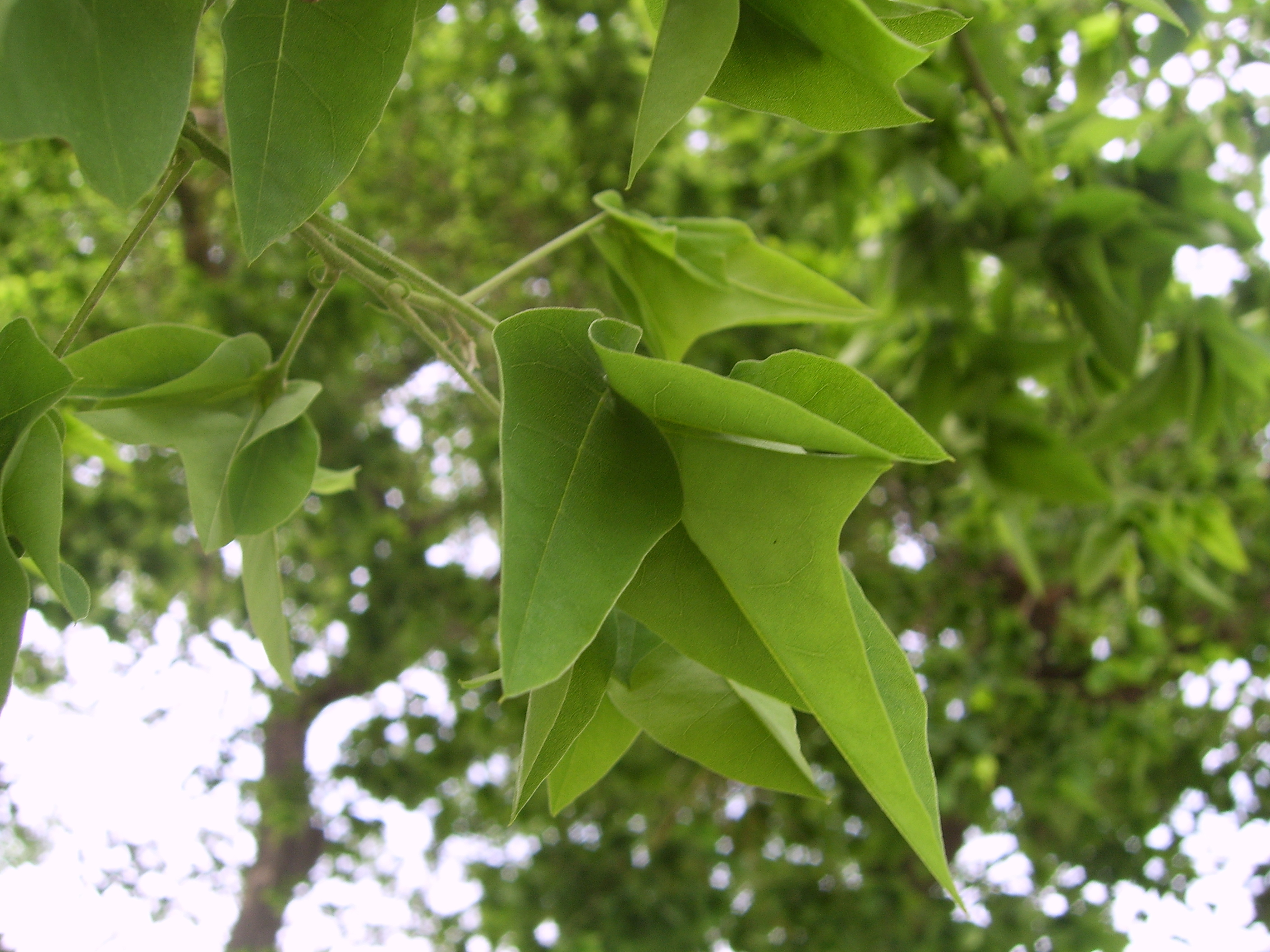 Styphnolobium japonicum (syn. Sophora japonica L.) f. oligophylla Franch 蝴蝶槐（五叶槐）国槐变种